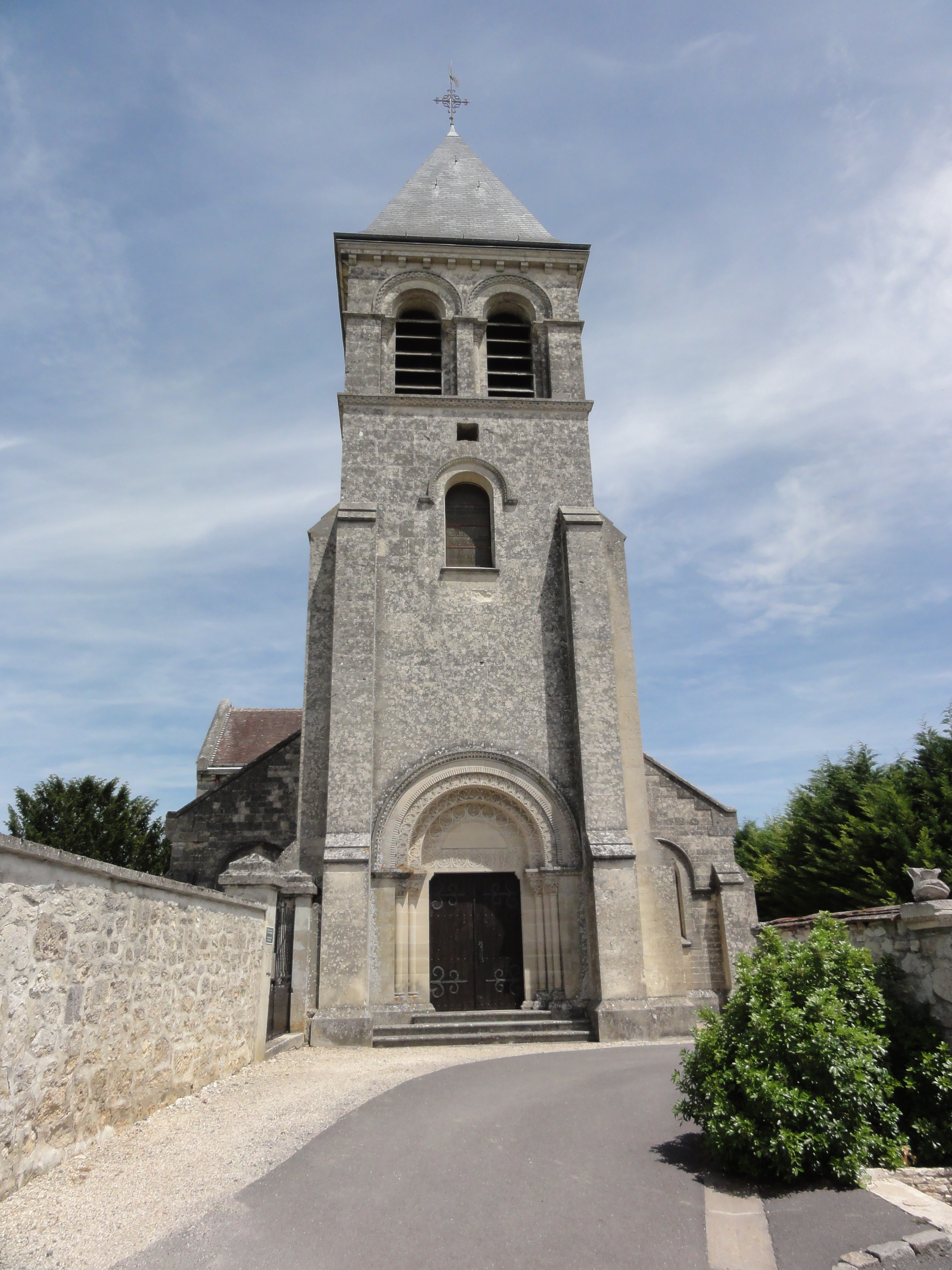 Vendresse-Beaulne (Aisne) église